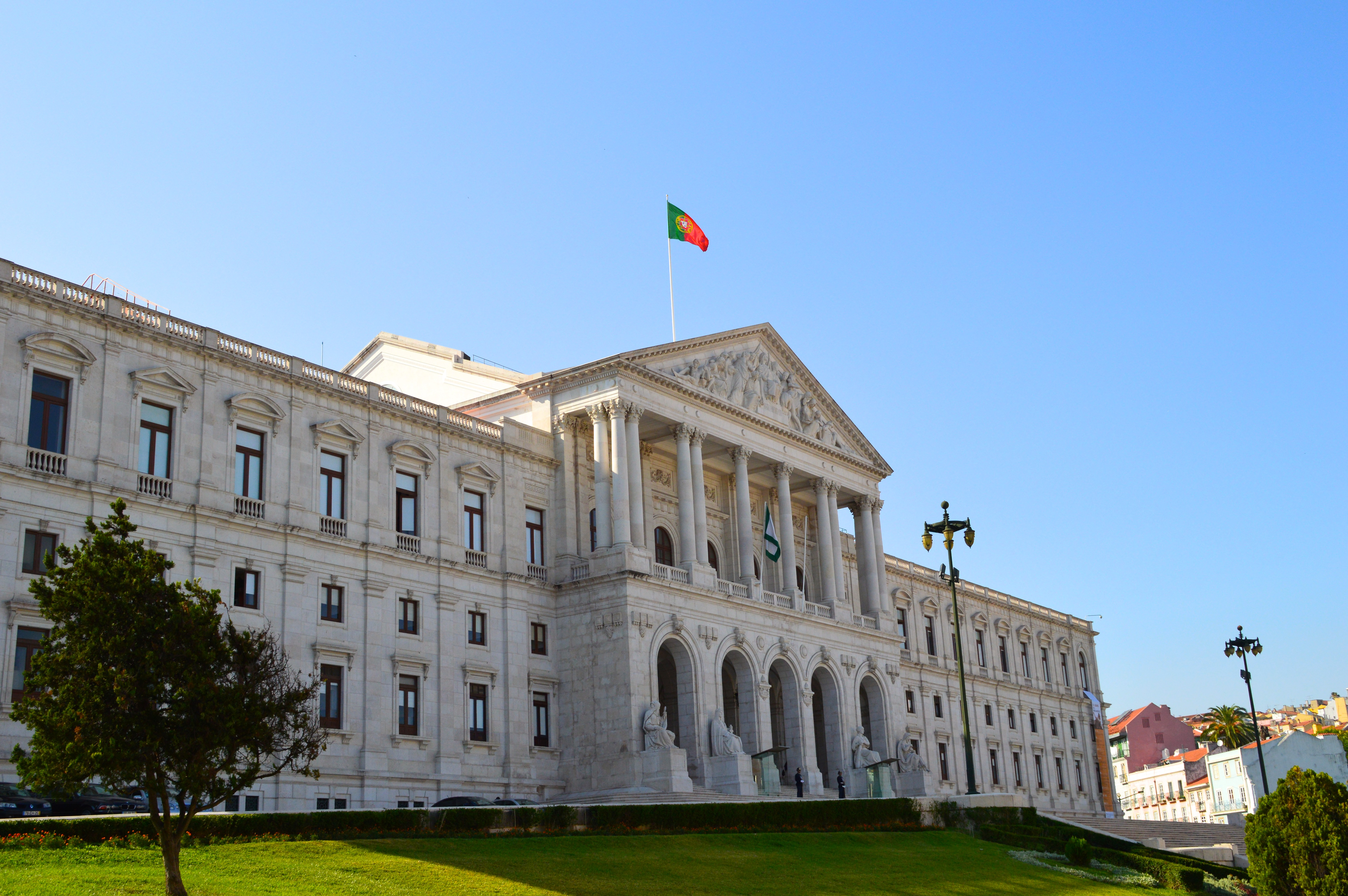 Palácio de São Bento (Assemblée nationale)